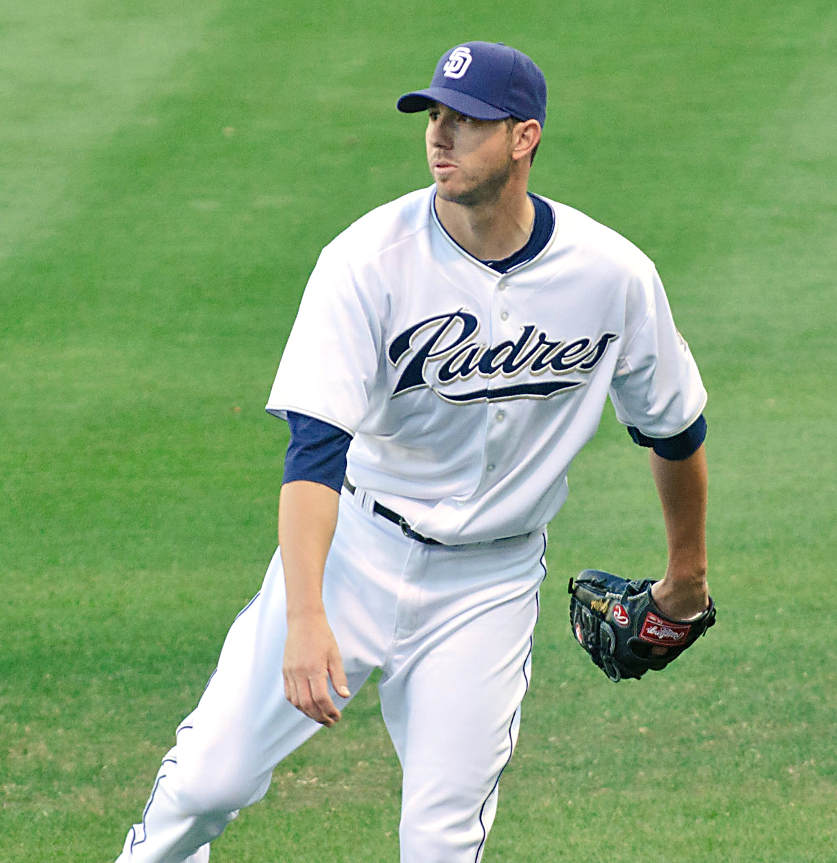 Jon Garland